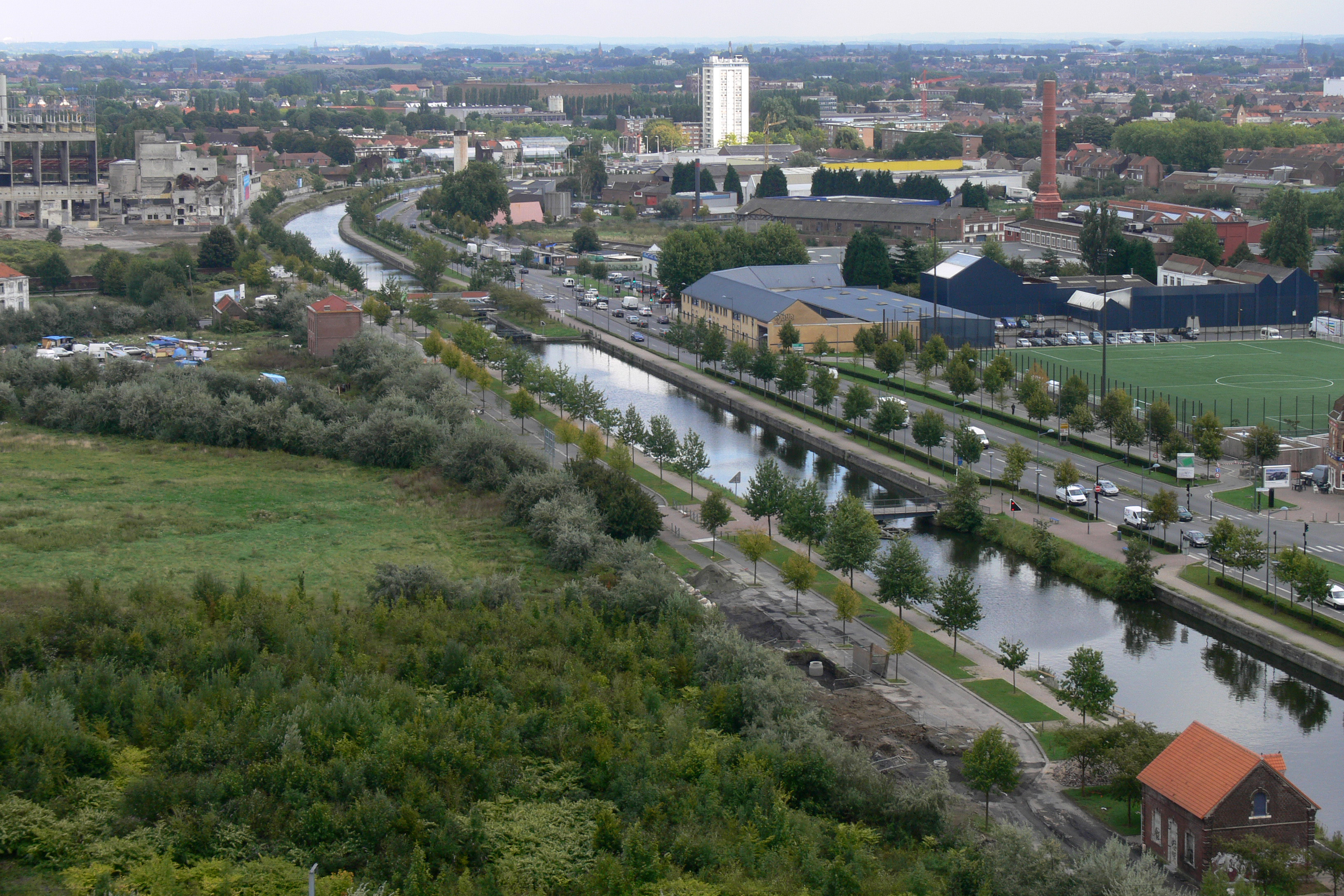 Zone de l'Union, (date de la photo : 2010-09-17). Secteur dit "Le drapé" ; Canal de Roubaix, écluse et pont tournant. .. et ancienne usine Terken au fond à gauche (future zone des "rives de l'Union")